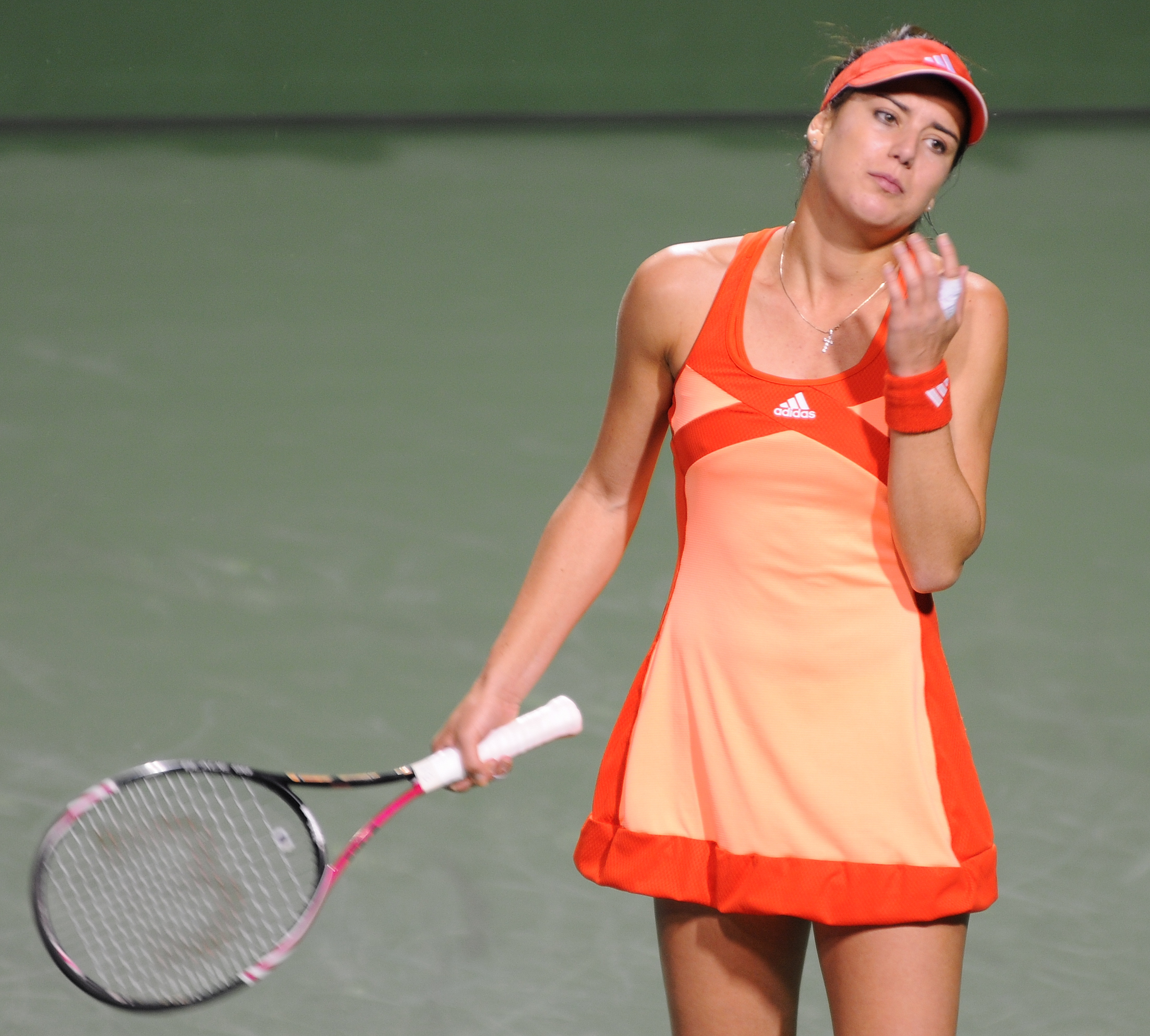 BNP Paribas Open 2012